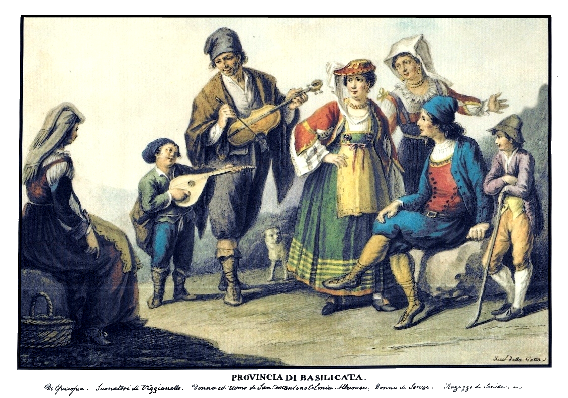 Costumi della Basilicata, prima del 1828; da sinistra a destra: Di Episcopia, Suonatori di Viggianello, Donna ed uomo di San Costantino colonia Albanese, Donna di Senise, Ragazzo di Senise.